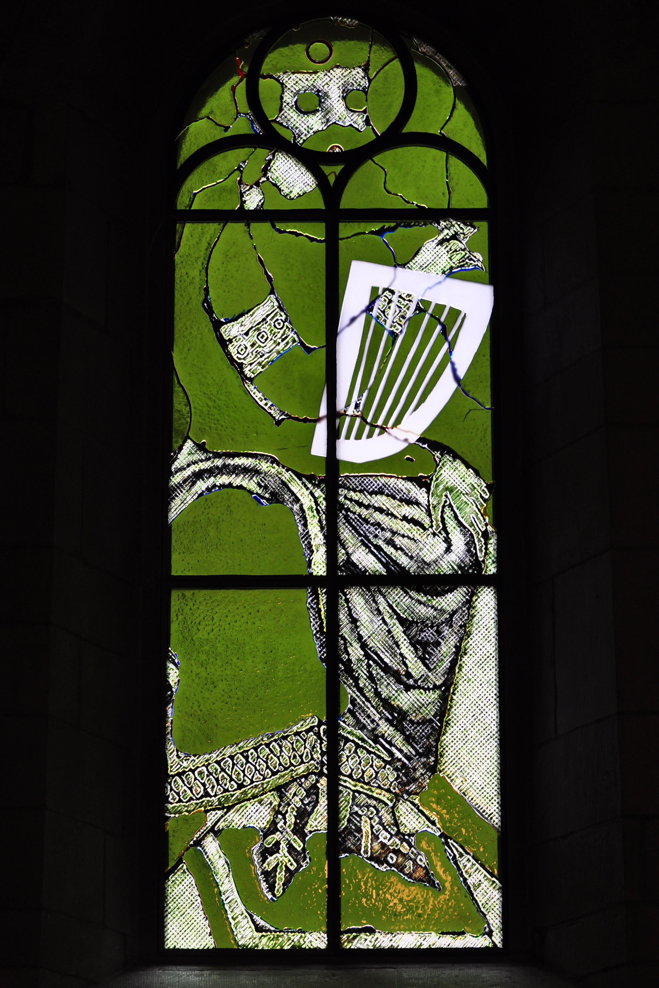 Grossmünster in Zürich (Switzerland)